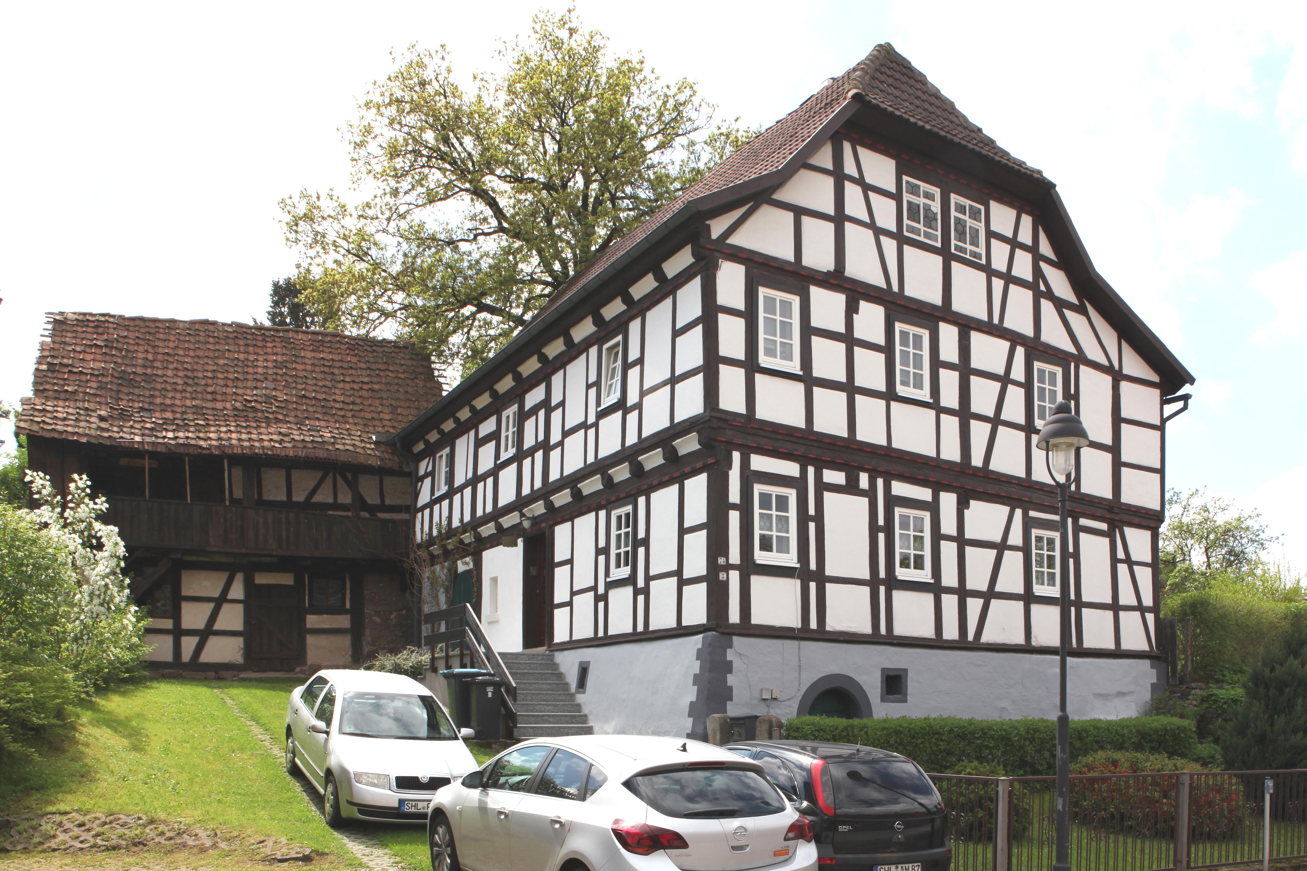 denkmalgeschütztes Fachwerkhaus in Neundorf, Ortsteil von Suhl